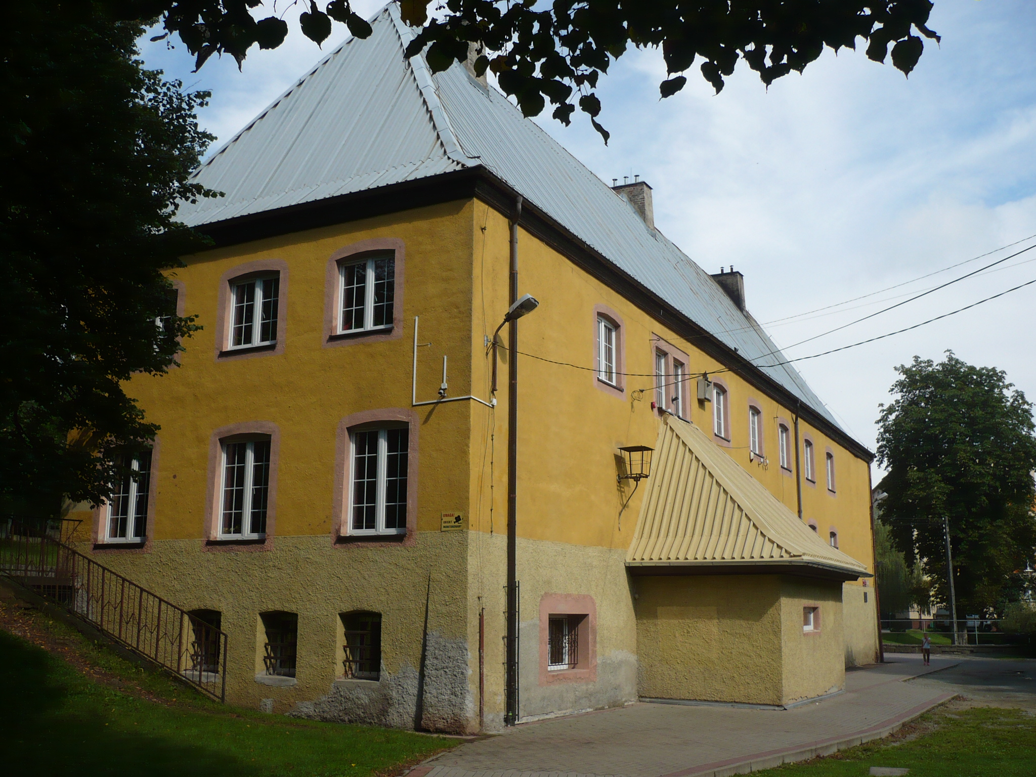 Nowa Ruda, ul. Sportowa 2 - pierwotnie siedziba Hitlerjugend, po 1945 Szkoła Podstawowa nr 2 im. Janusza Korczaka, 1938